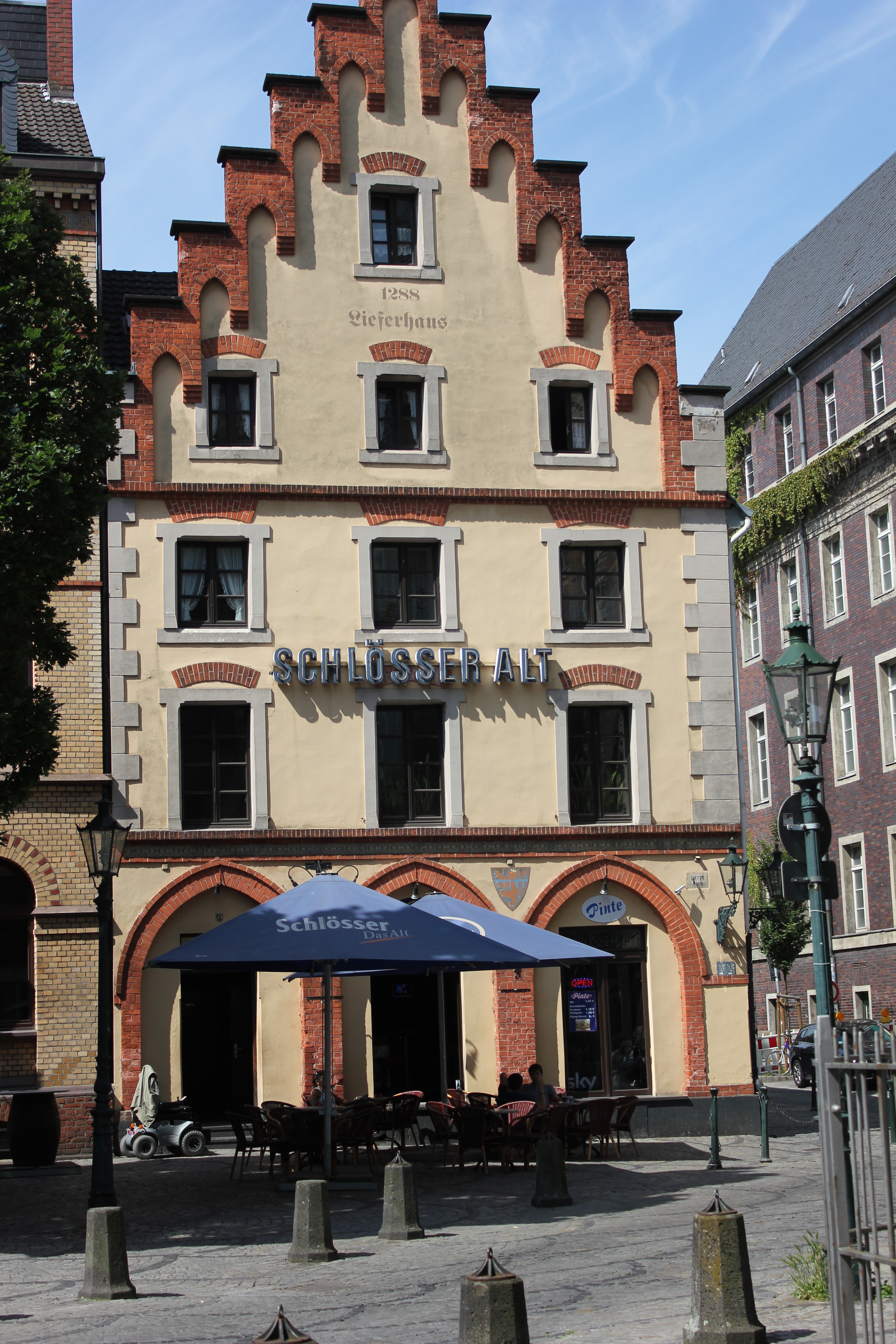 Das Löwenhaus wird auch Lieferhaus genannt und ist in der Altstadt von Düsseldorf unter der Anschrift Liefergasse 9 zu finden.